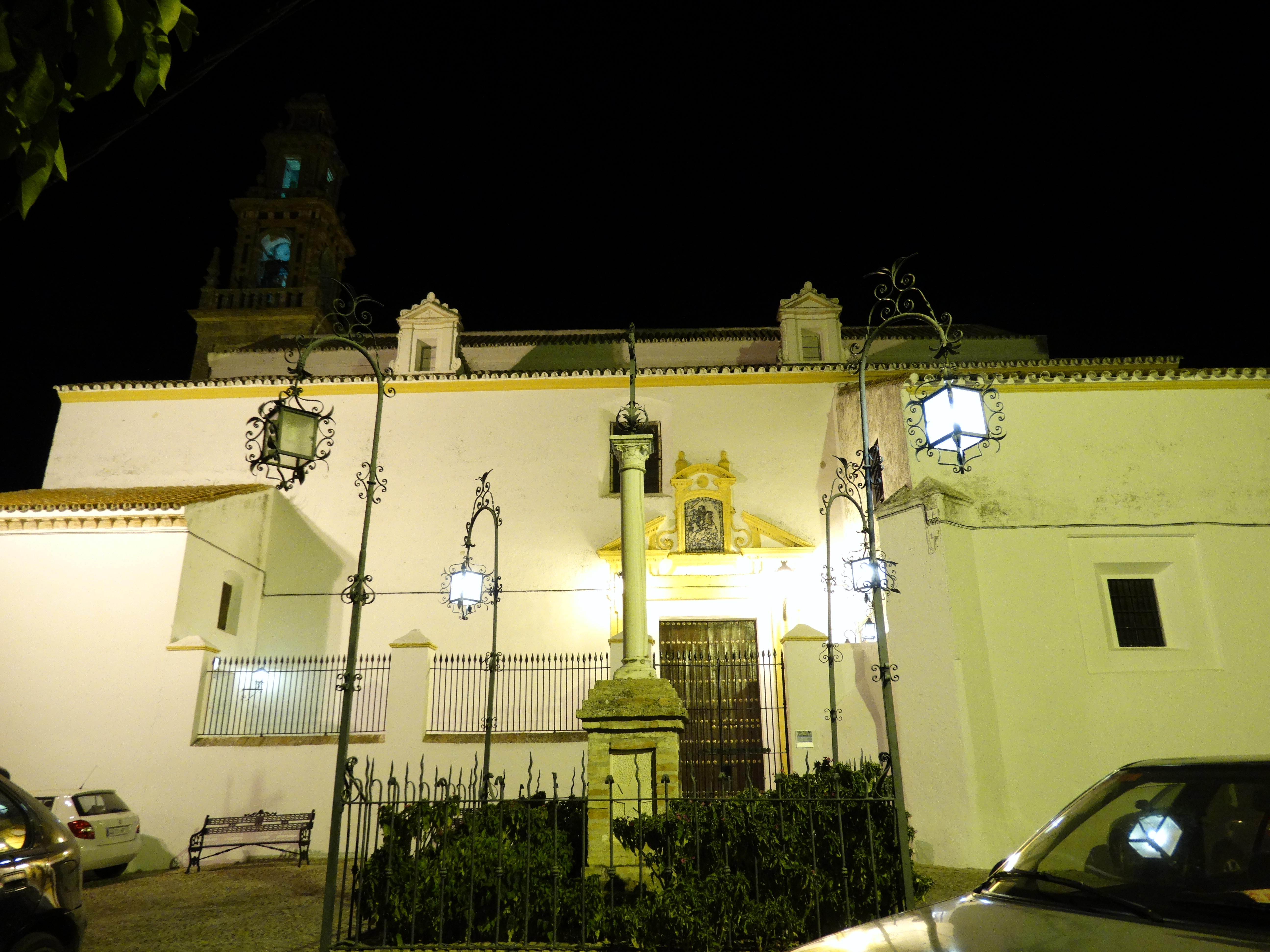 Plazuela de Santiago junto a la iglesia del mismo nombre.